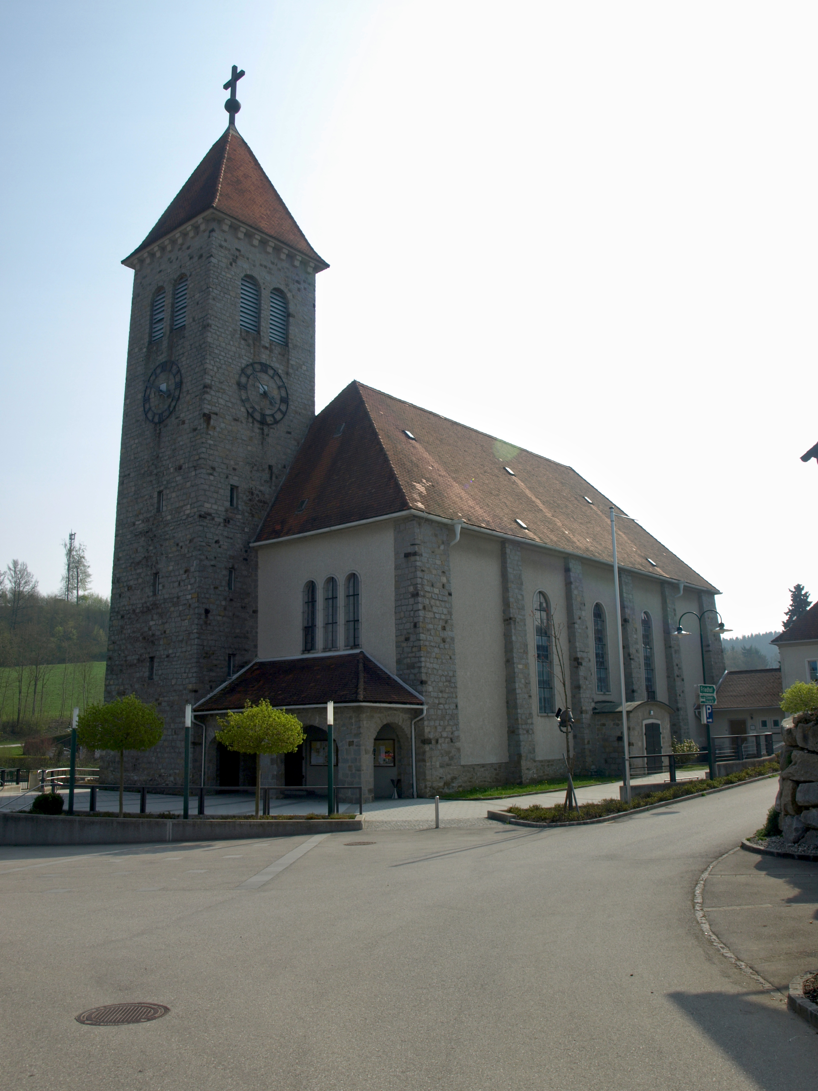 Kath. Pfarrkirche Vestenthal